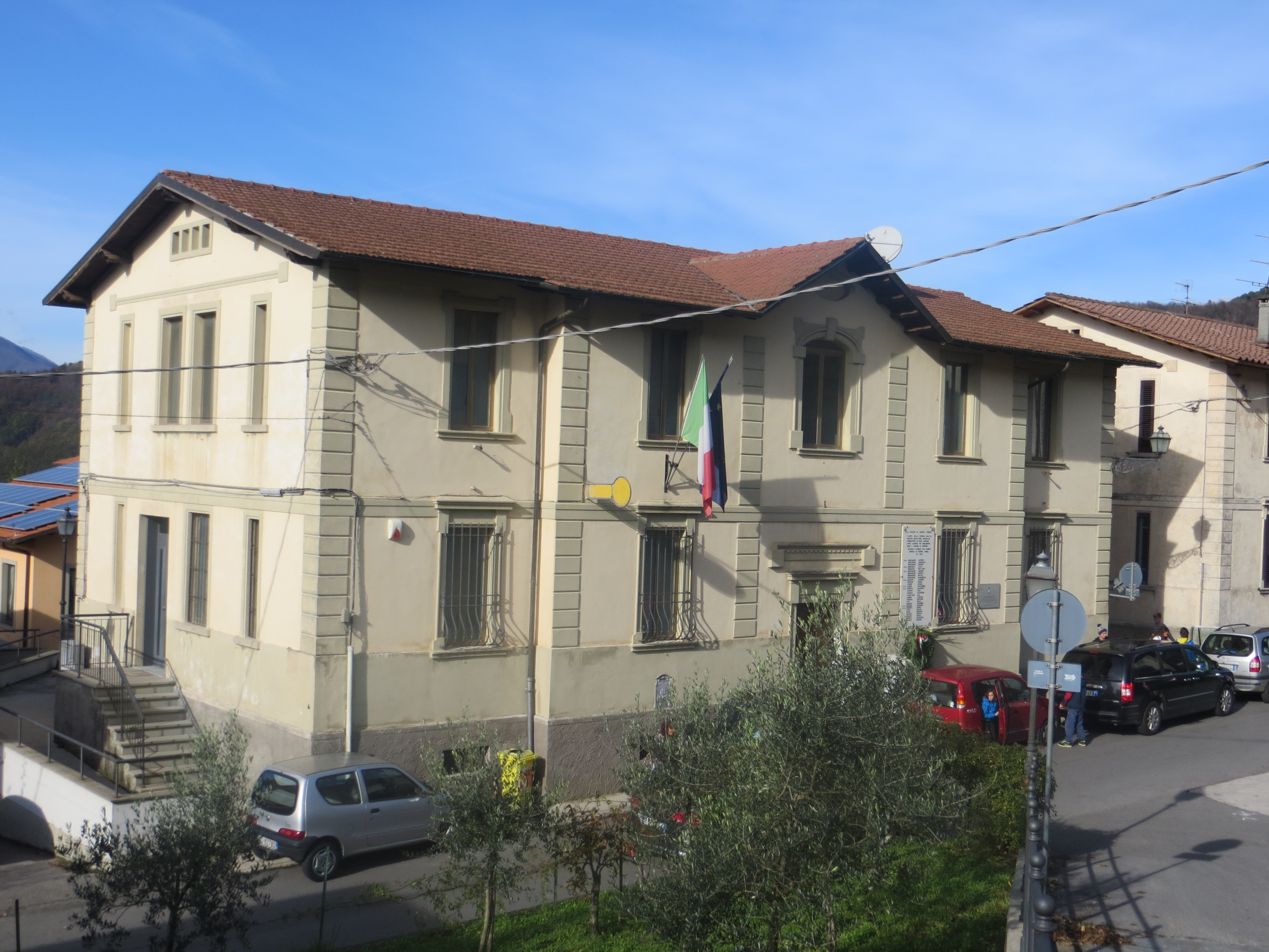 Municipio di Fosciandora